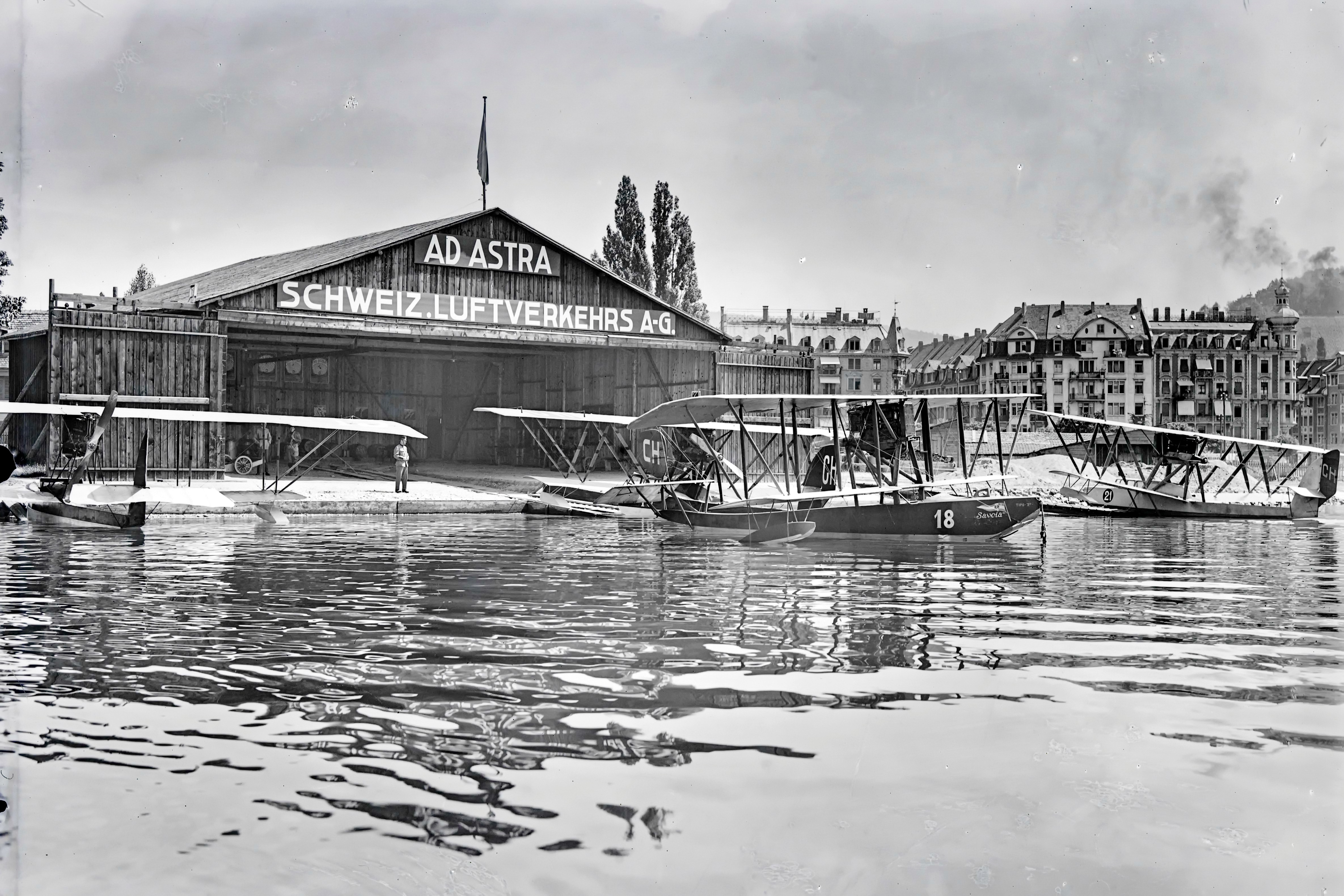 Flugboote der Ad Astra Aero S.A. beim Zürichhorn. Im Hintergrunddas Gelände des heutigen Strandbads Tiefenbrunnen sowie die Bellerivestrasse im Umfeld des heutigen Bahnhofs Tiefenbrunnen.